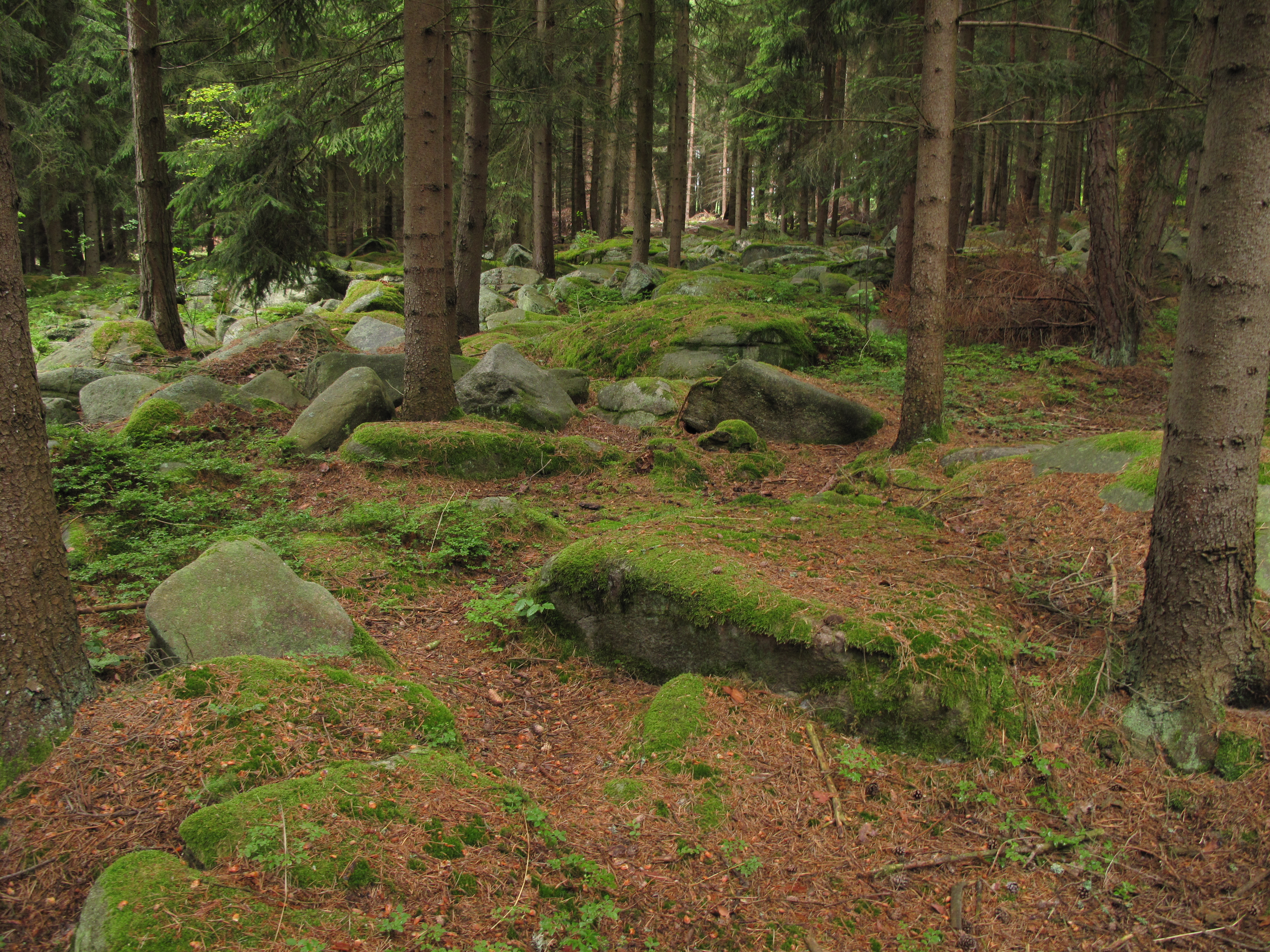 Přírodní rezervace Štamberk a kamenné moře. Okres Jihlava, Česká republika.